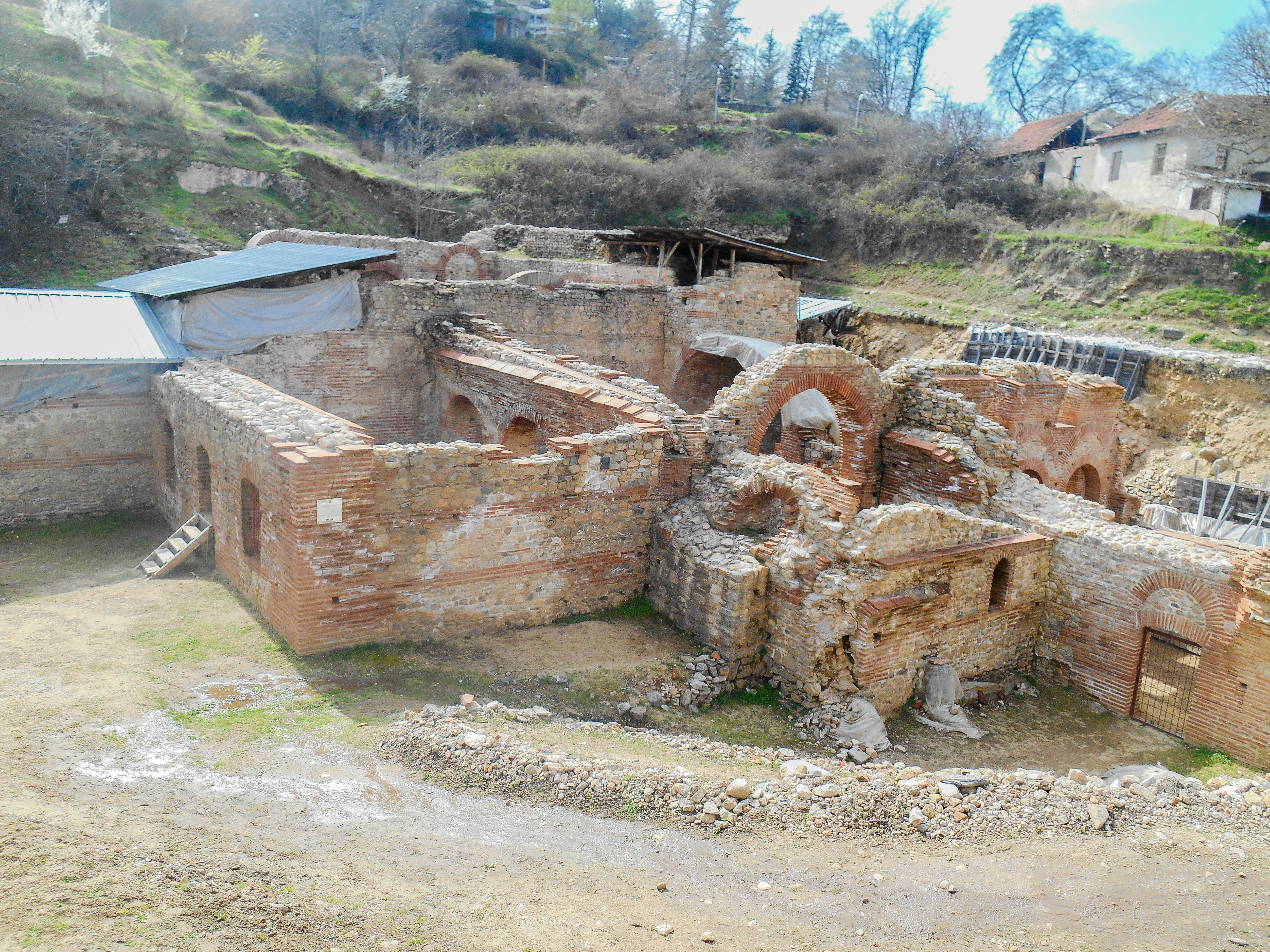 Римска бања